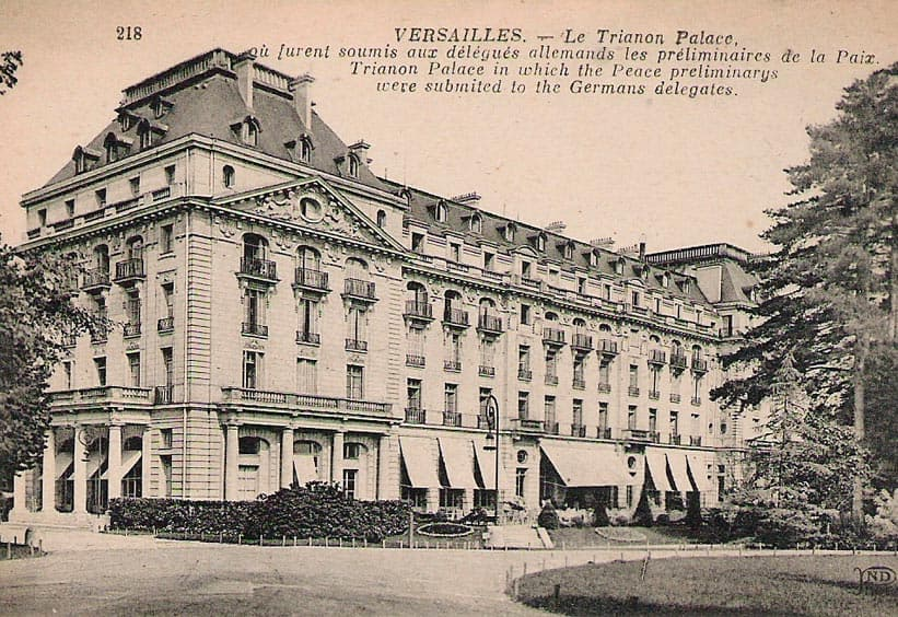 Versailles - Trianon Palace